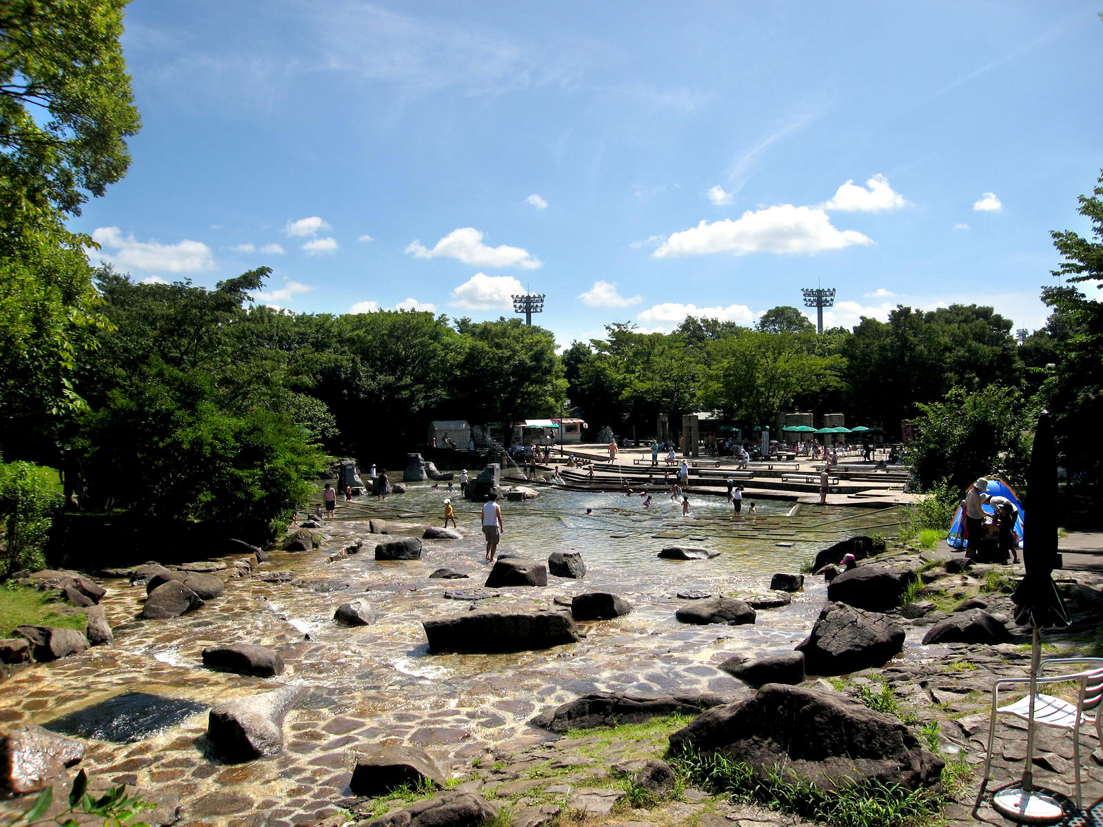 水遊びの池（府中市郷土の森博物館）